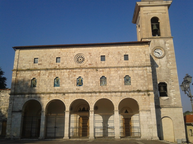 Facciata della basilica di Pescina